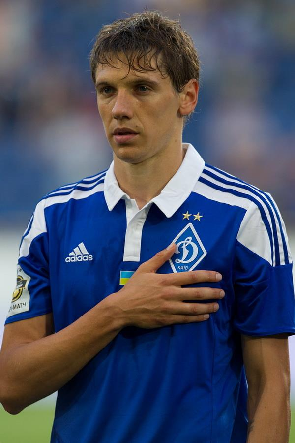 Денис Гармаш - футболіст Динамо